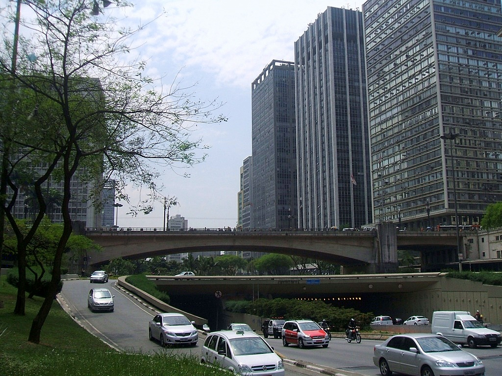 Vista do Viaduto do Chá e dos edifícios no Vale do Anhangabaú, a partir da Praça da Bandeira. Cidade de São Paulo, Brasil